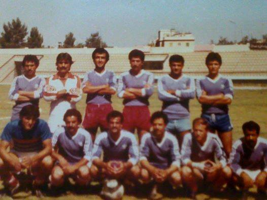 نادي جرمانا لكرة القدم 1983